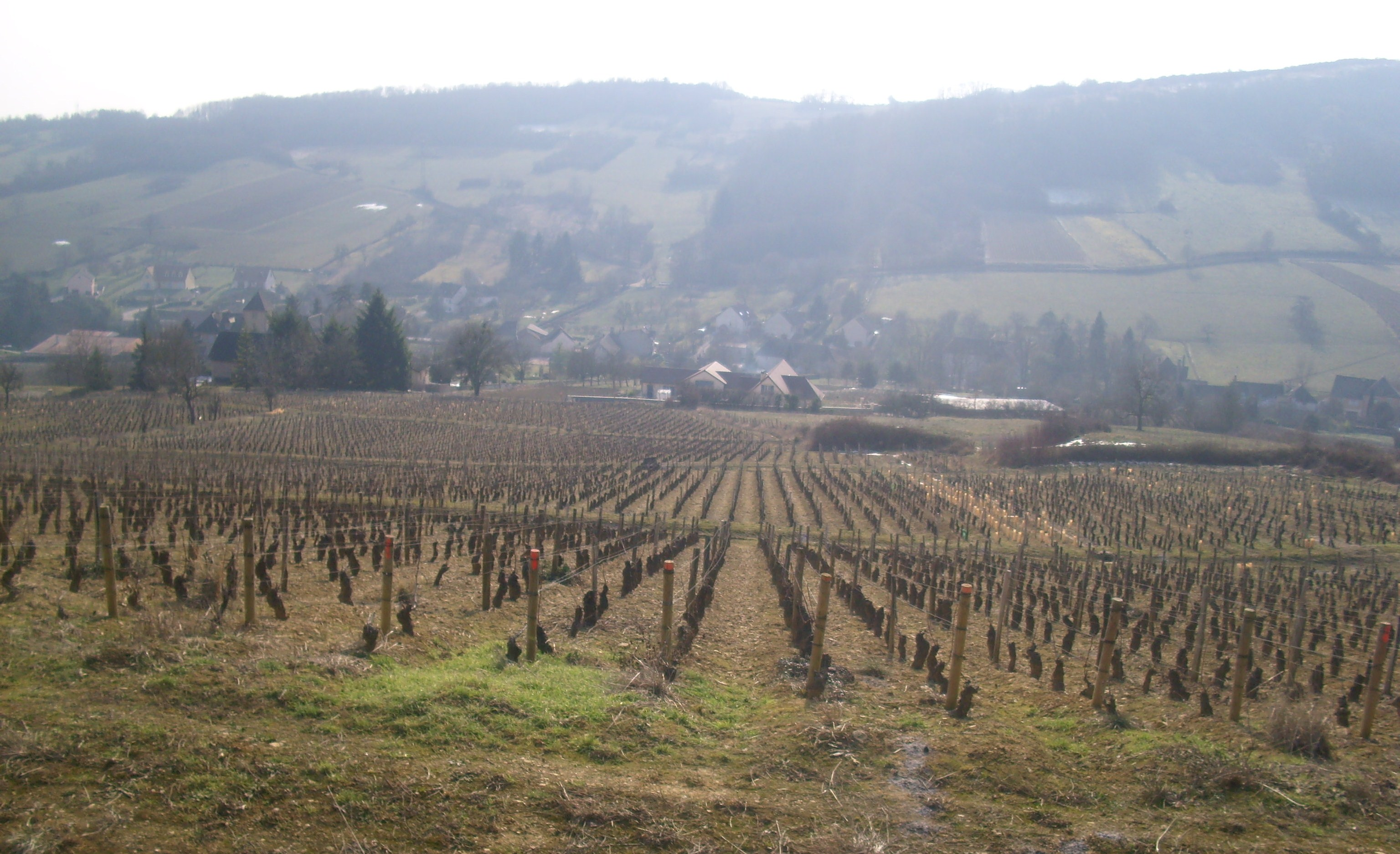 Vue d'une partie des vignes à Jambles (71)